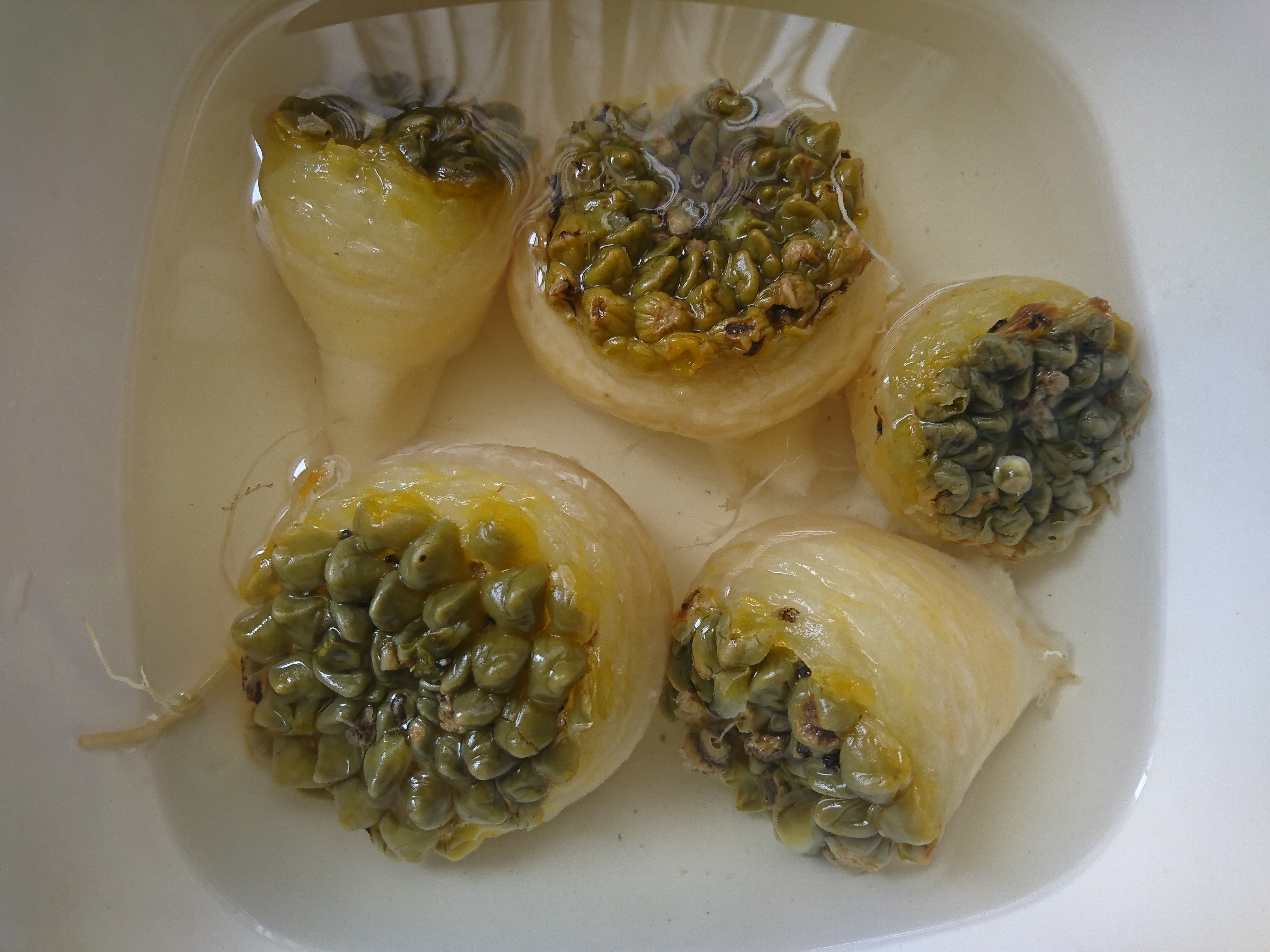 Neowerdermannia vorwerkii en remojo, ya cocida y en proceso para su cocción, preparación y utilización en gastronomía local de Bolivia. Adquirida ya cocida y con los espinos retirados en Oruro.